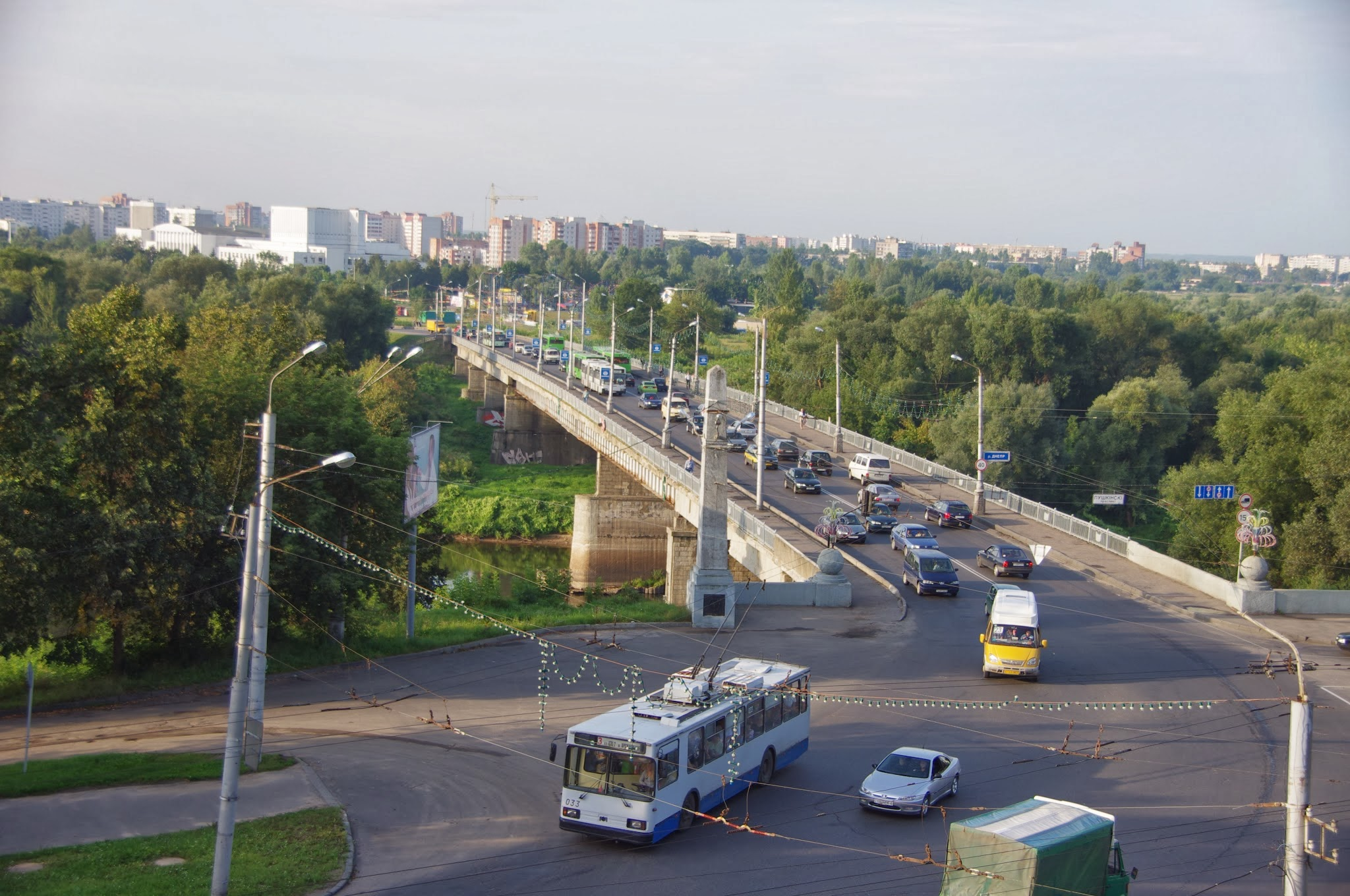 Lieninski District, Mogilev, Belarus